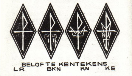 4 Beloftekentekens van de Chiro in 1955